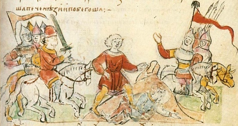 Победа русского богатыря над печенежским, и дальнейшее преследование печенегов русскими в 992 году.